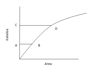 Bonjean kurba